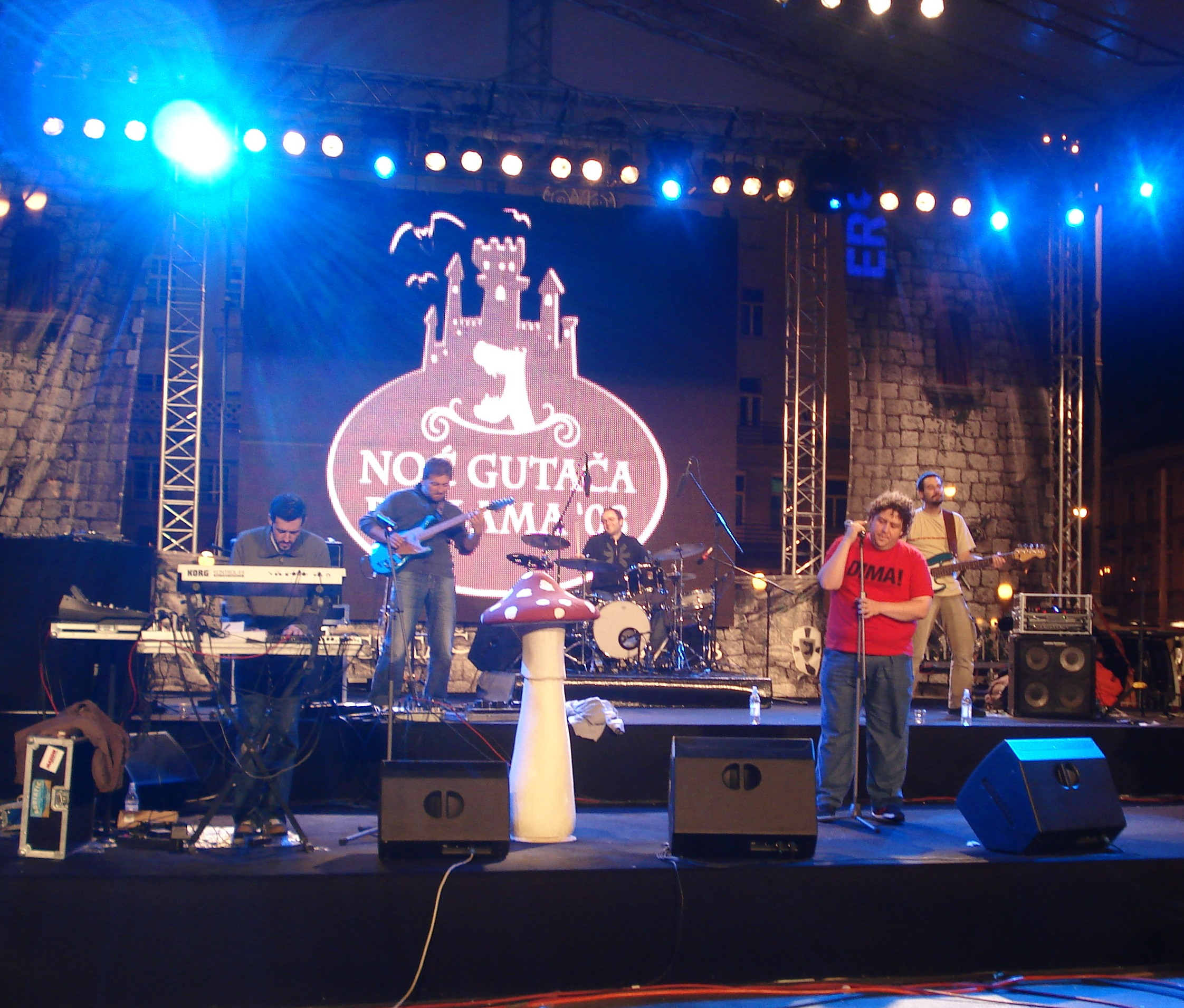 TBF, nastup na Noći gutača reklama